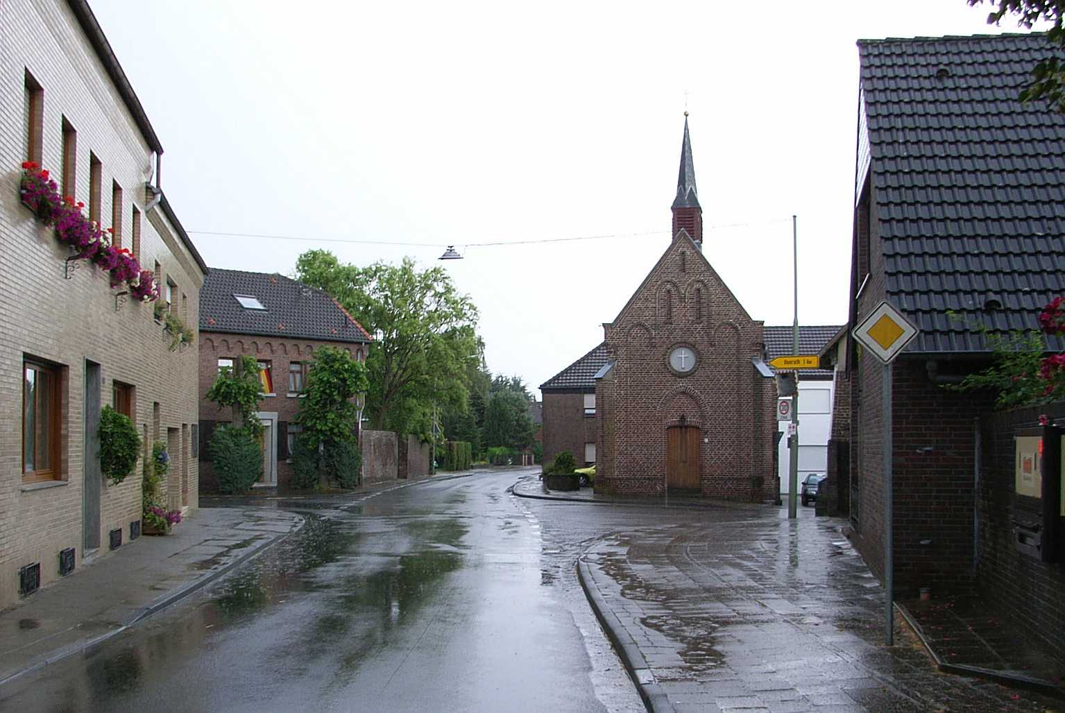 Ortsdurchfahrt Kaulhausen (Erkelenz). Sonstiges